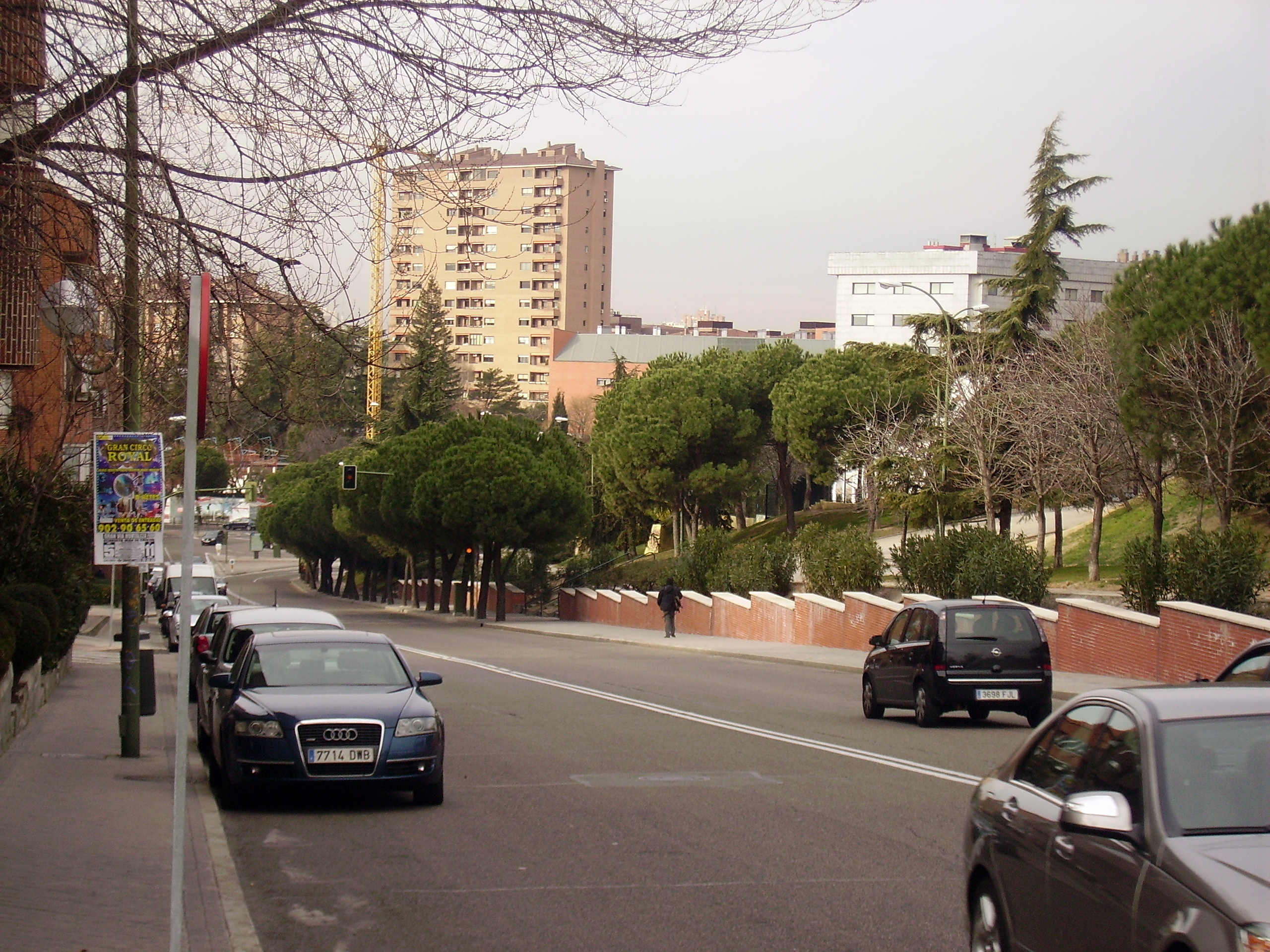 Canillas, Madrid, Spain